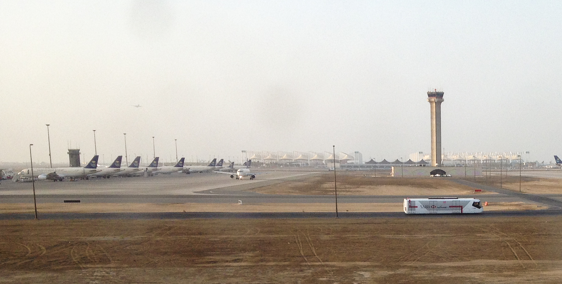 Jeddah Airport